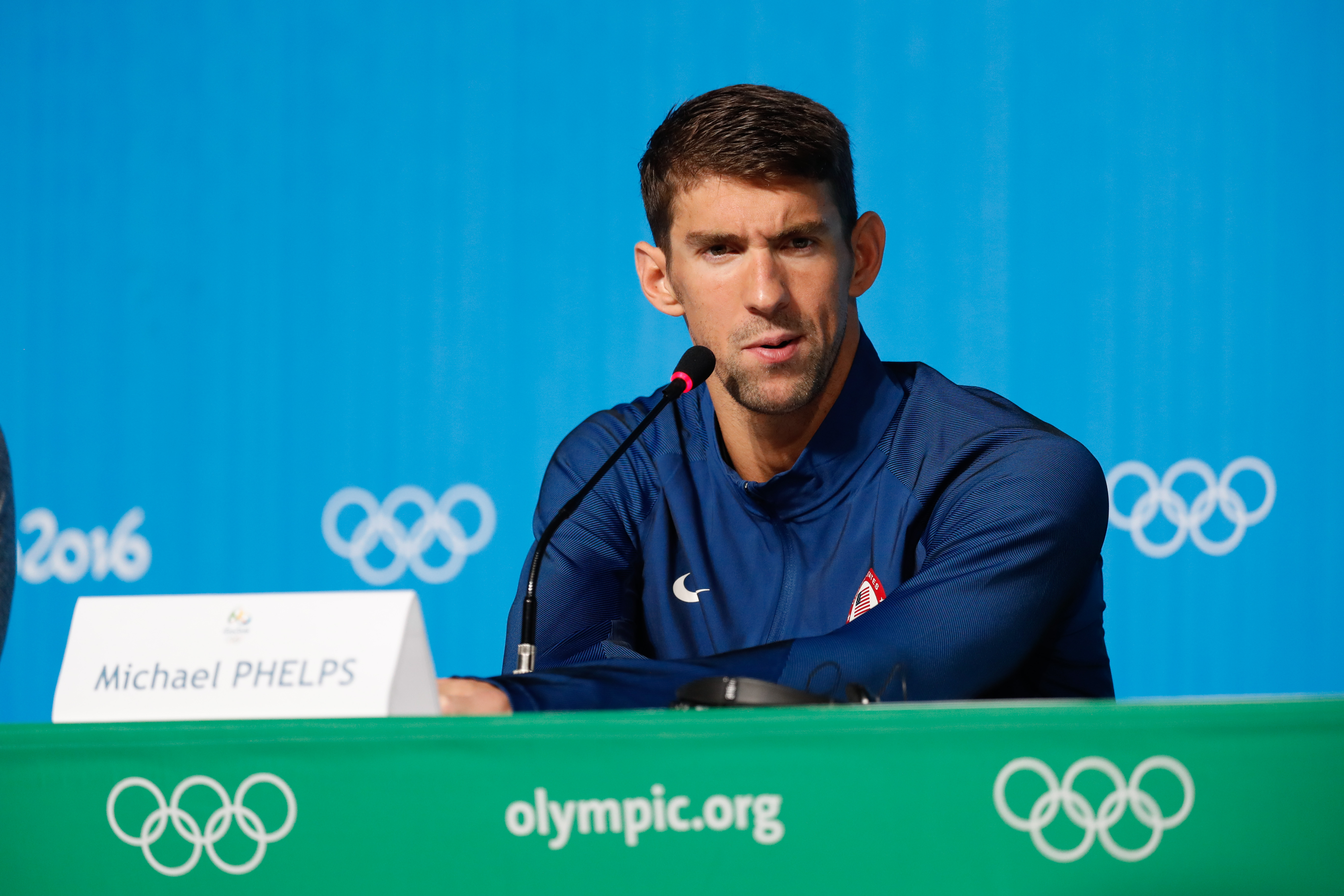 Rio de Janeiro - O nadador Michael Phelps, norte-americano recordista de medalhas olímpicas, 22, concede entrevista no Parque Olímpico dos Jogos Rio 2016 (Fernando Frazão/Agência Brasil)